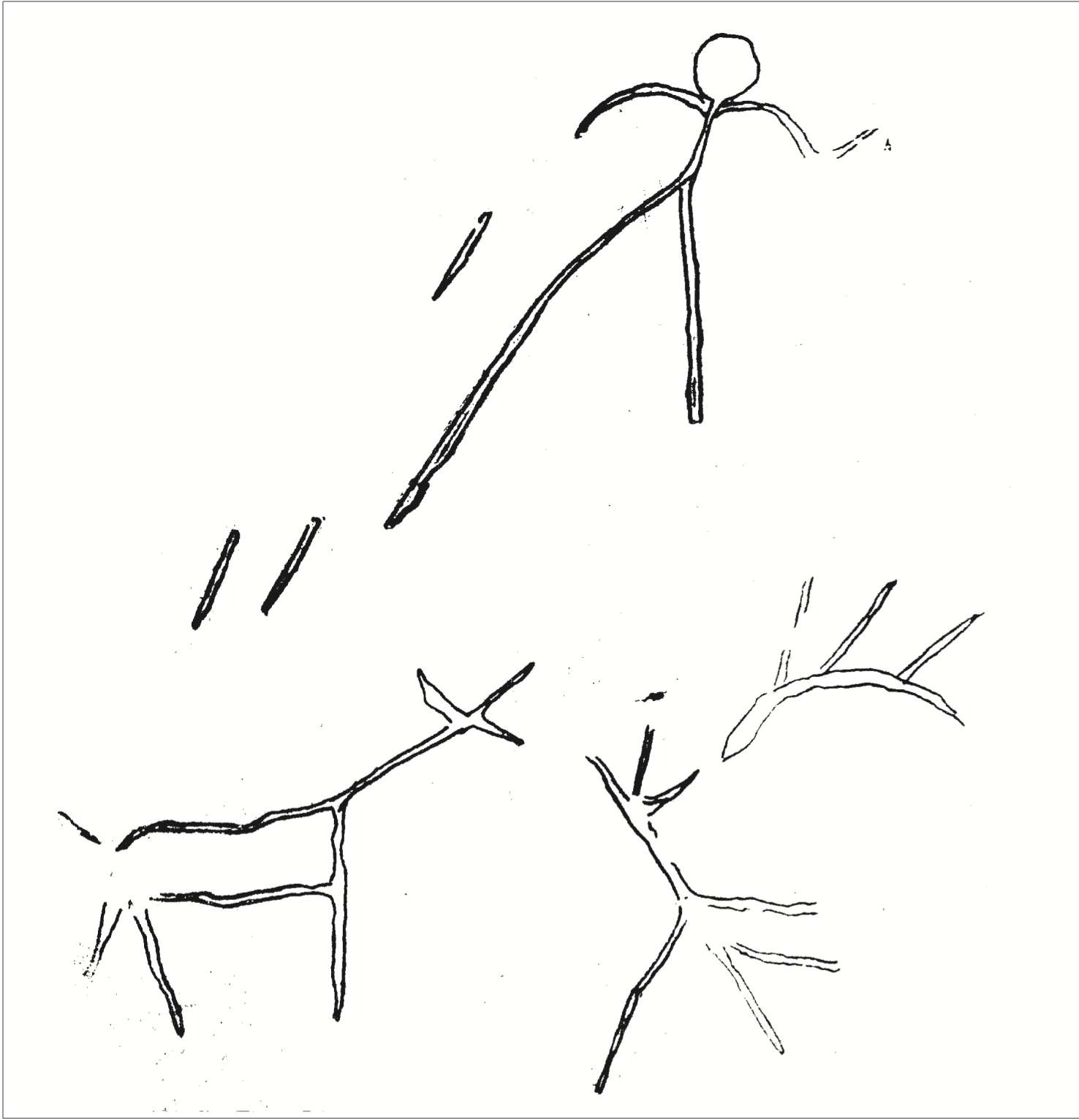 Disegno delle incisioni in Tuppo dei Sassi - Filiano (PZ), eseguito dal prof. Rinaldi